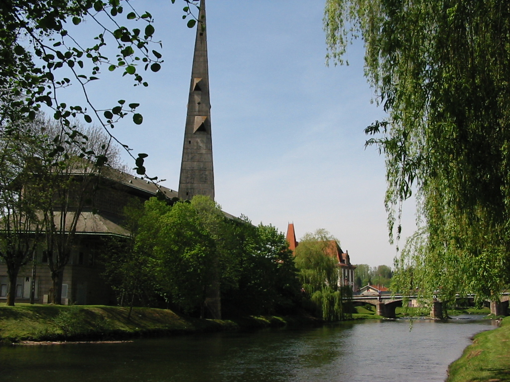 L'église Saint-Remy de Baccarat Commune de Baccarat (Meurthe-et-Moselle) Au premier plan, la Meurthe Photographie personnelle, prise le 4 mai 2006 Copyright © Christian Amet